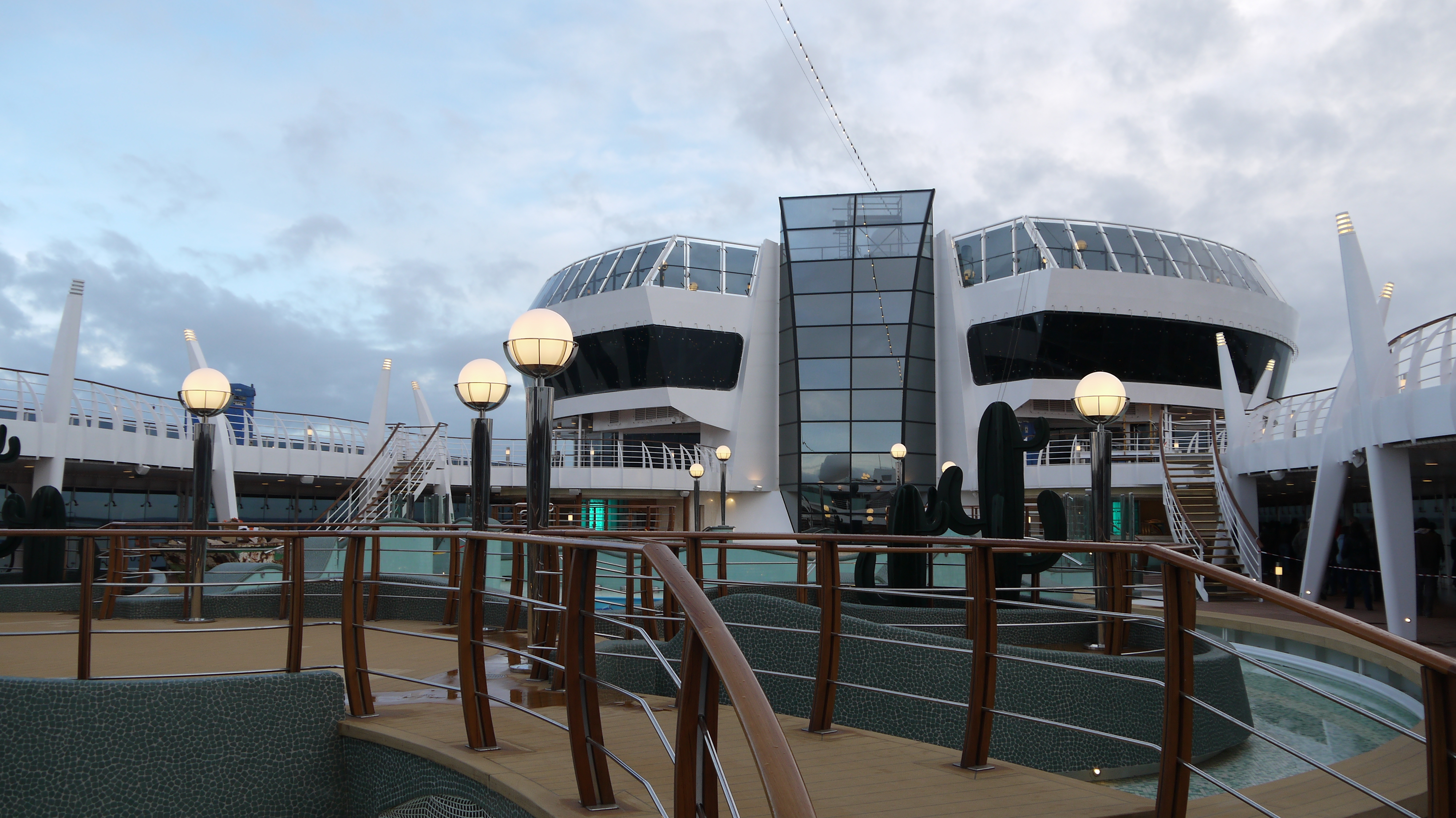 Le palace flottant "MSC Preziosa" prêt à être livré par les chantiers STX France à Saint-Nazaire.